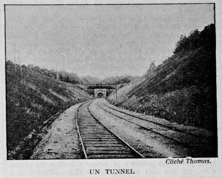 publié dans le "Bulletin de l'œuvre des voyages scolaires".